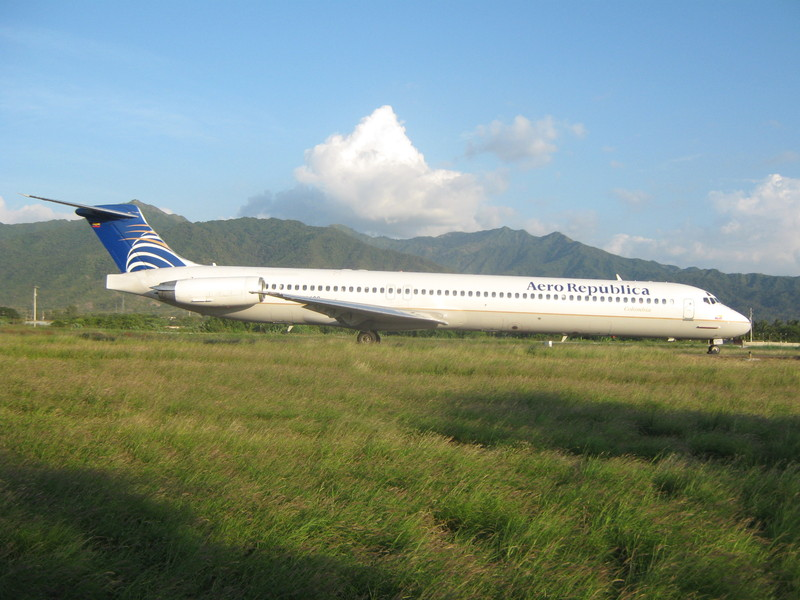 McDonnell Douglas- MD83 de AeroRepública en el Aeropuerto Internacional Simón Bolívar de Santa Marta.